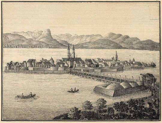 Lindau am Bodensee Federlithographie? Bildgröße 12,5 x 16,5 cm. Aus Neue Bildergallerie für die Jugend, IV. Band (Gotha 1831) Heft 6 Seite 42 (Text) Taf. 48 Nr. 358.